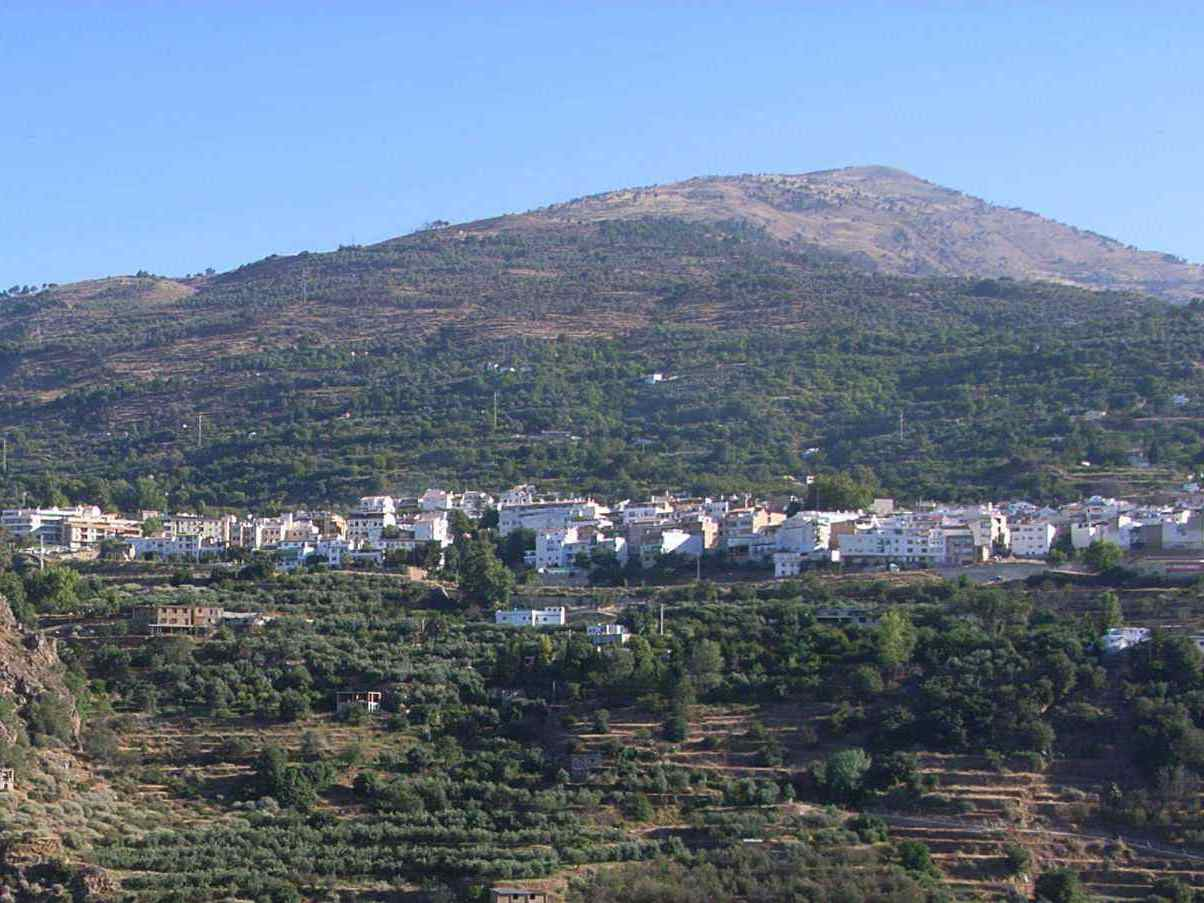 Lanjarón (Granada, España)